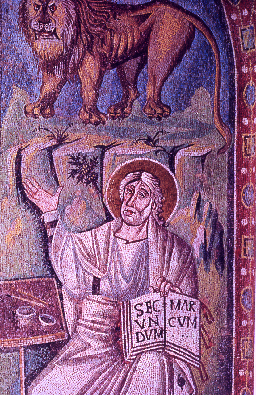 Servizio fotografico : Ravenna, 1965 / Paolo Monti. - Foglio: 1, Fotogrammi complessivi: 12/20 : Diapositiva, sviluppo cromogeno/ pellicola ; 35 mm. - ((Le diapositive nn. 01-03 costituiscono un'altra serie. - Sullo chassis della diapositiva n. 4 Monti specifica: "Mosaici Ravenna". - Occasione: Documentazione per la pubblicazione: Cecchi Emilio, Sapegno Natalino (a cura di), "Storia della Letteratura Italiana", 9 voll., Milano, Garzanti, 1966 e segg. - Fonte: Agenda di Paolo Monti: Diapositive 24x36mm (1948-1982), presso Archivio Paolo Monti